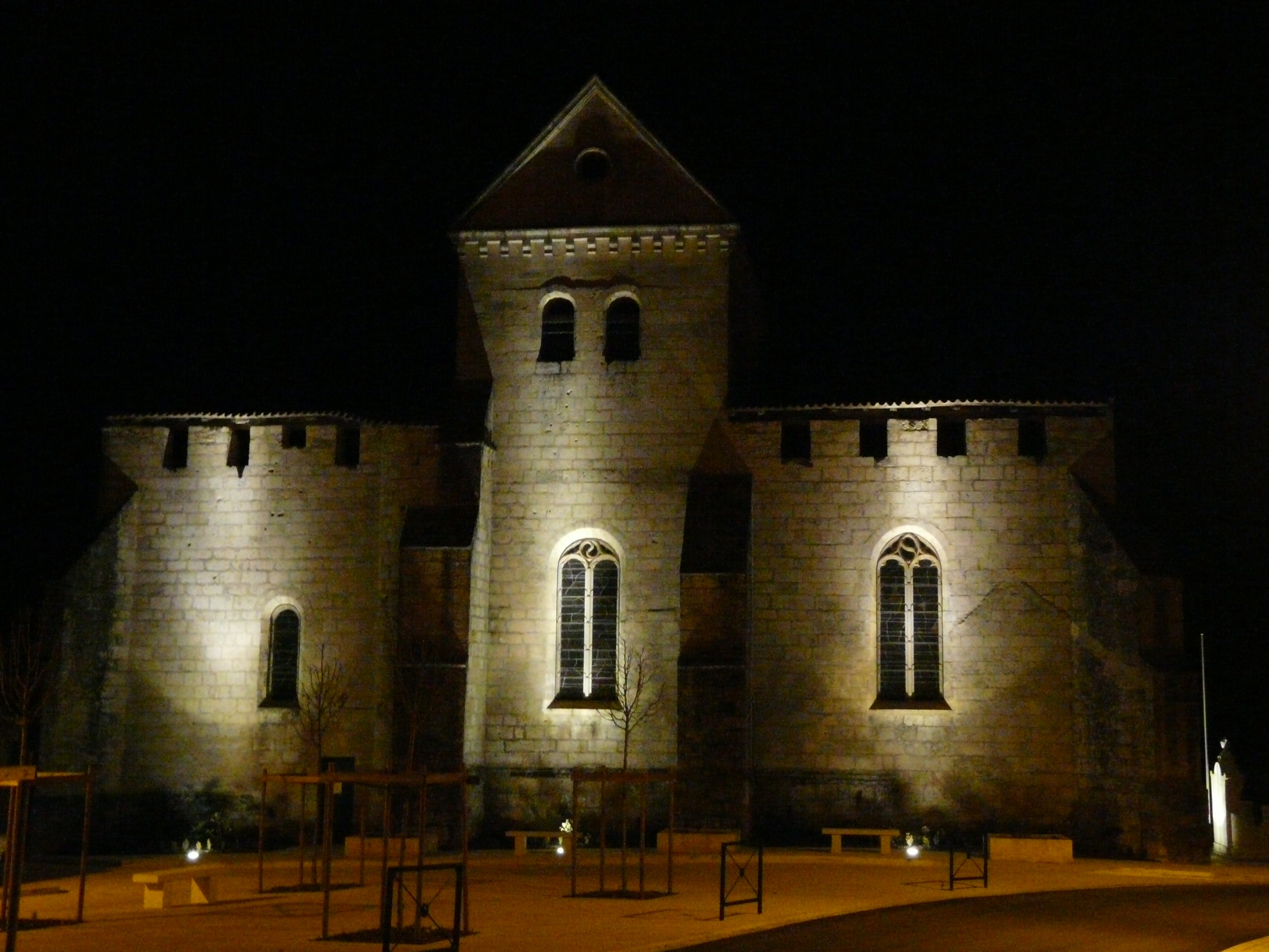 La façade sud de l'église Notre-Dame de la Nativité, Monsec, Dordogne, France. Photo prise de nuit.